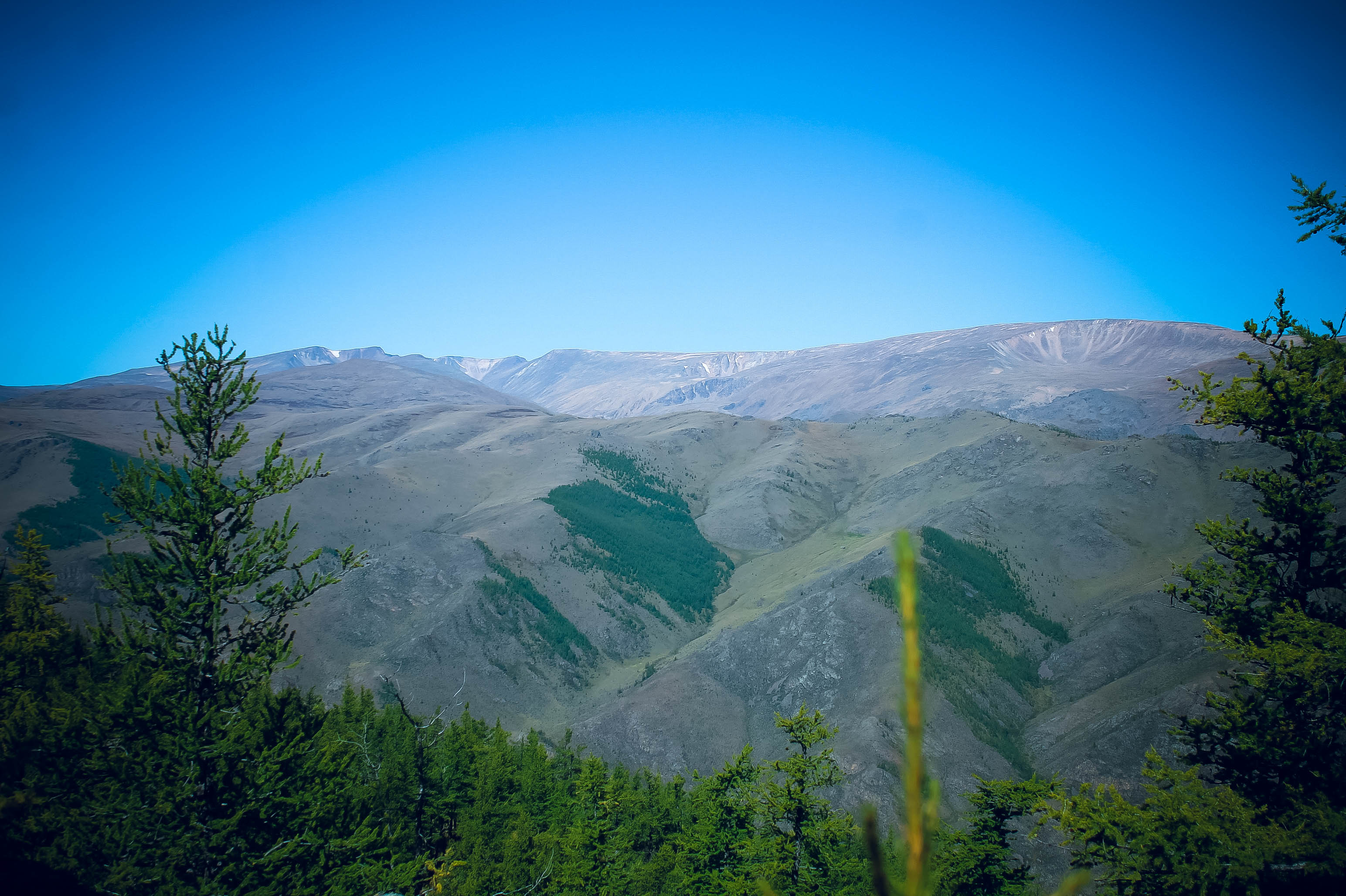 Перешеек